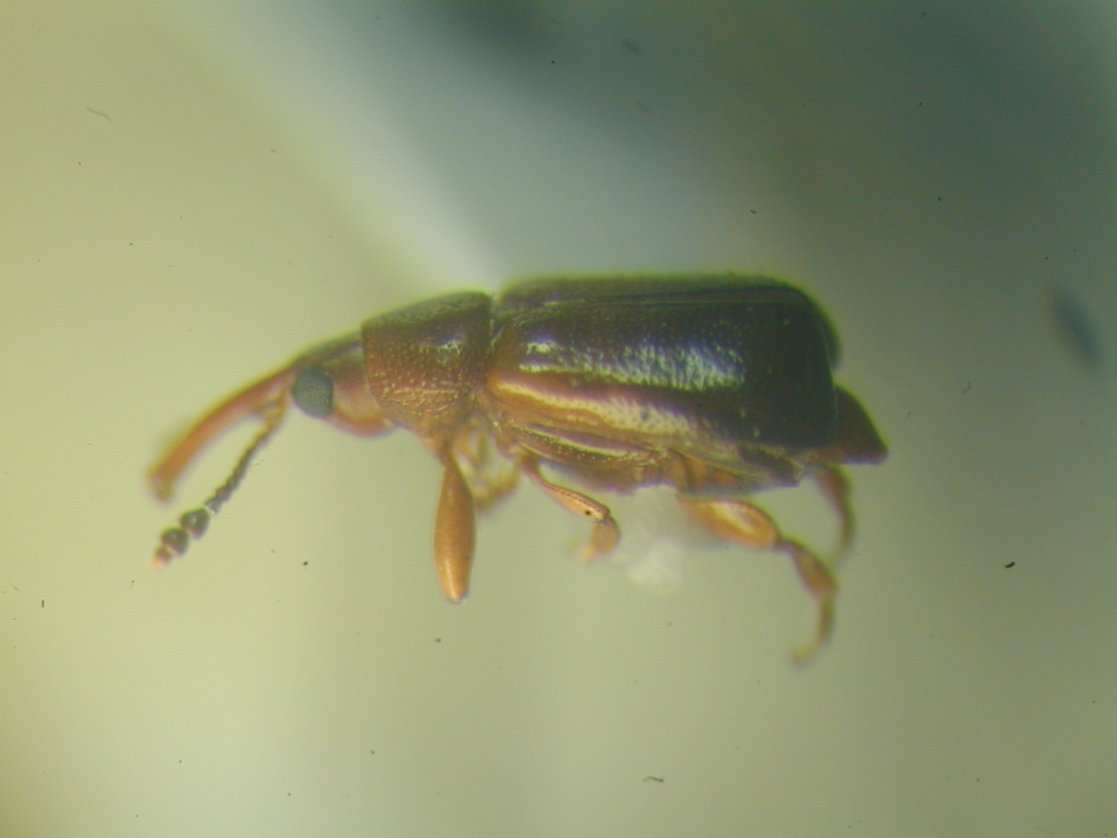 Rhopalotria dimidiata (Coleoptera:Curculionoidea:Belidae), female. From Cuban Zamia